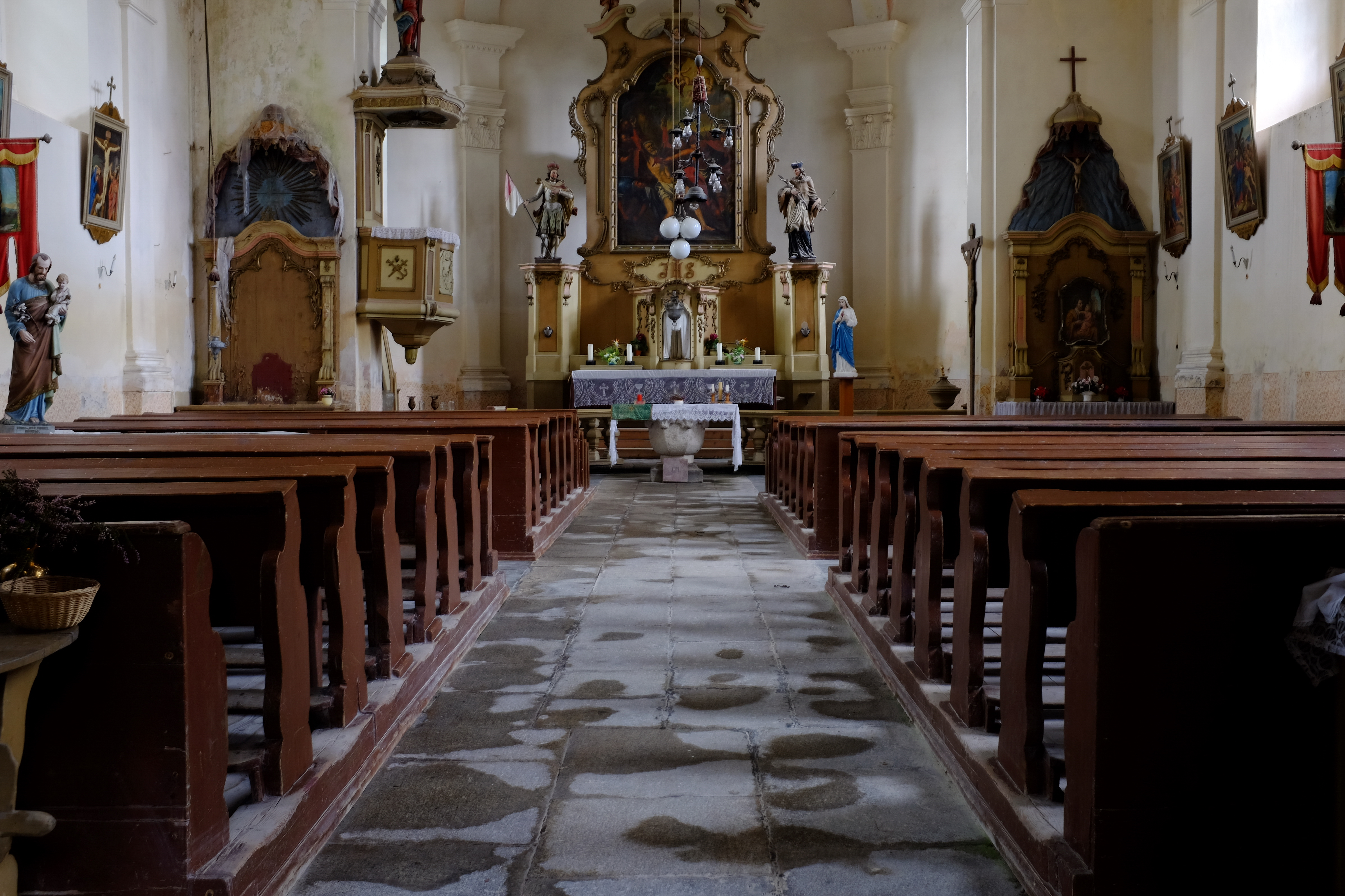 Kostel svatého Bartoloměje, Přebuz.